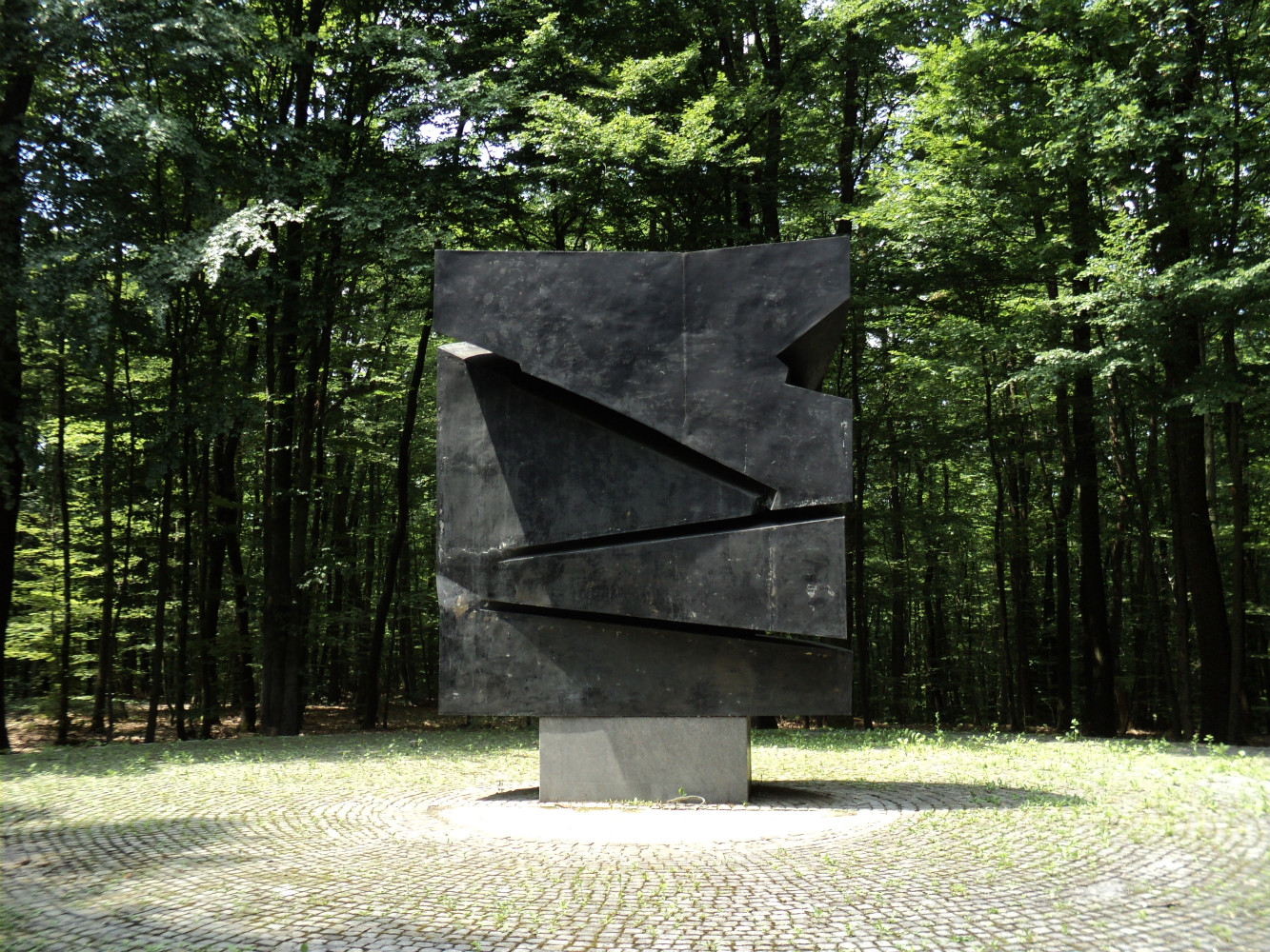 Spomenik žrtvama fašizma, Dotršćina. Self-made. Jun 2011. Author is Plamen